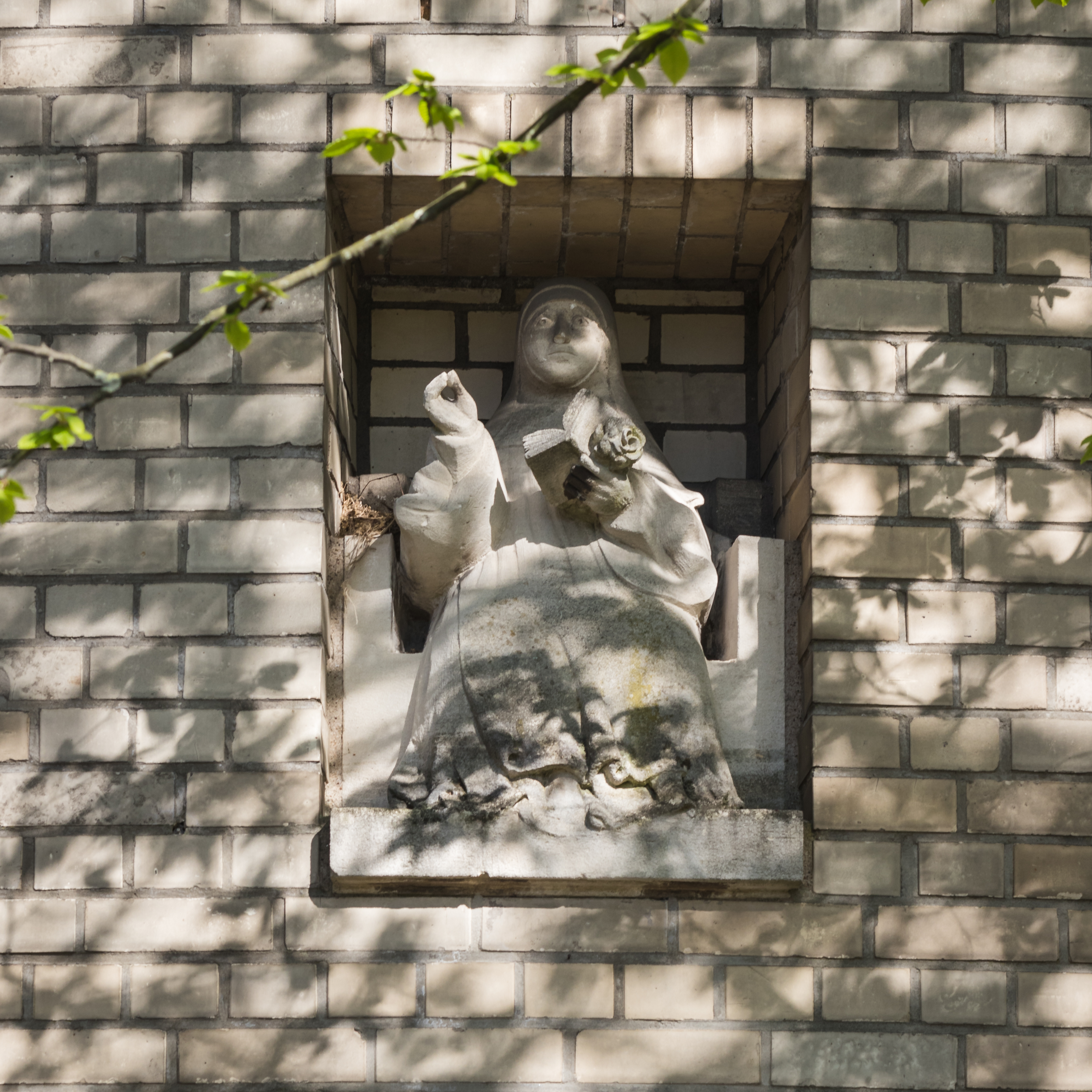 Hildegard-Skulptur am Eingangsportal der Kirche St. Hildegard in der Au in Nippes